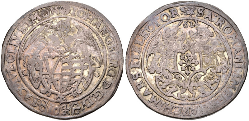 GERMANY, Sachsen-Albertinische Linie (Kurfürstentum). Johann Georg I. 1611-1656. AR 60 Kipper Groschen (42mm, 23.01 g, 7h). Dresden mint. Dated 1622. Angel bearing coat-of-arms / Two angels bearing trilobe coat-of-arms. Rahnenführer 157. VF, toned.